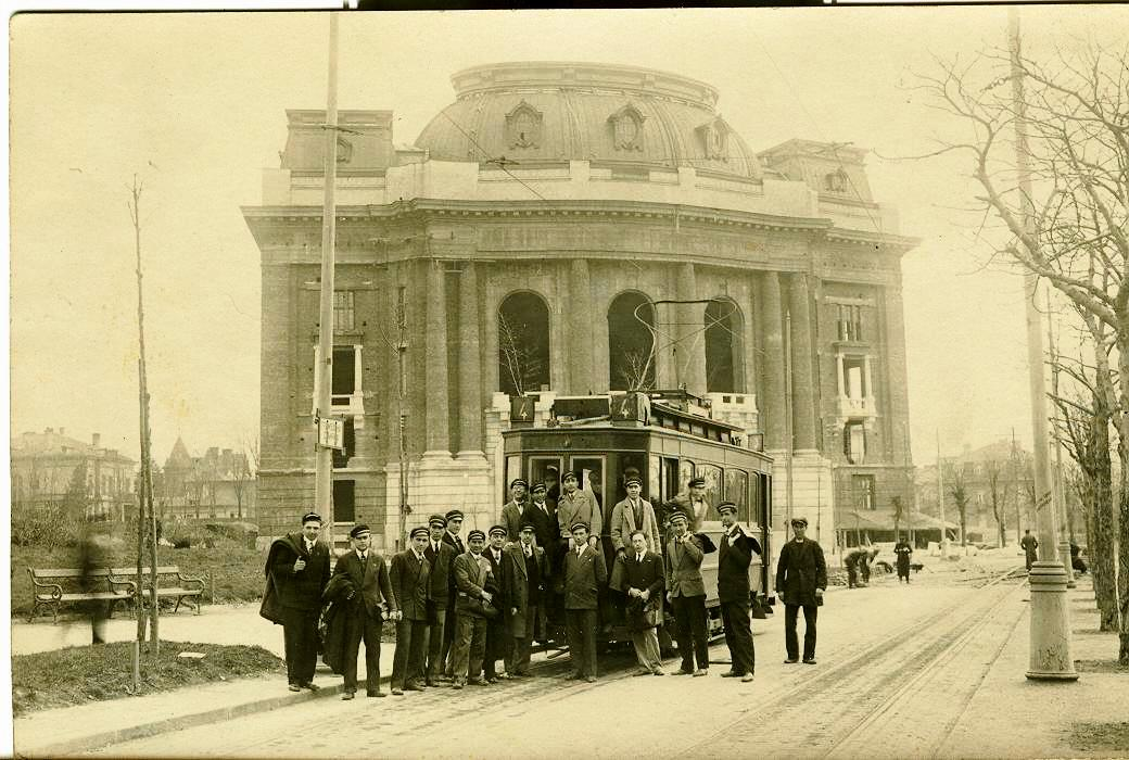 Група студенти от Медицинския факултет на Софийския университет,при сградата на Ректората на СУ,който е в строеж,снимани през месец март 1930г. Снимката е от архива на проф.д-р Панайот Ст.Коларов.